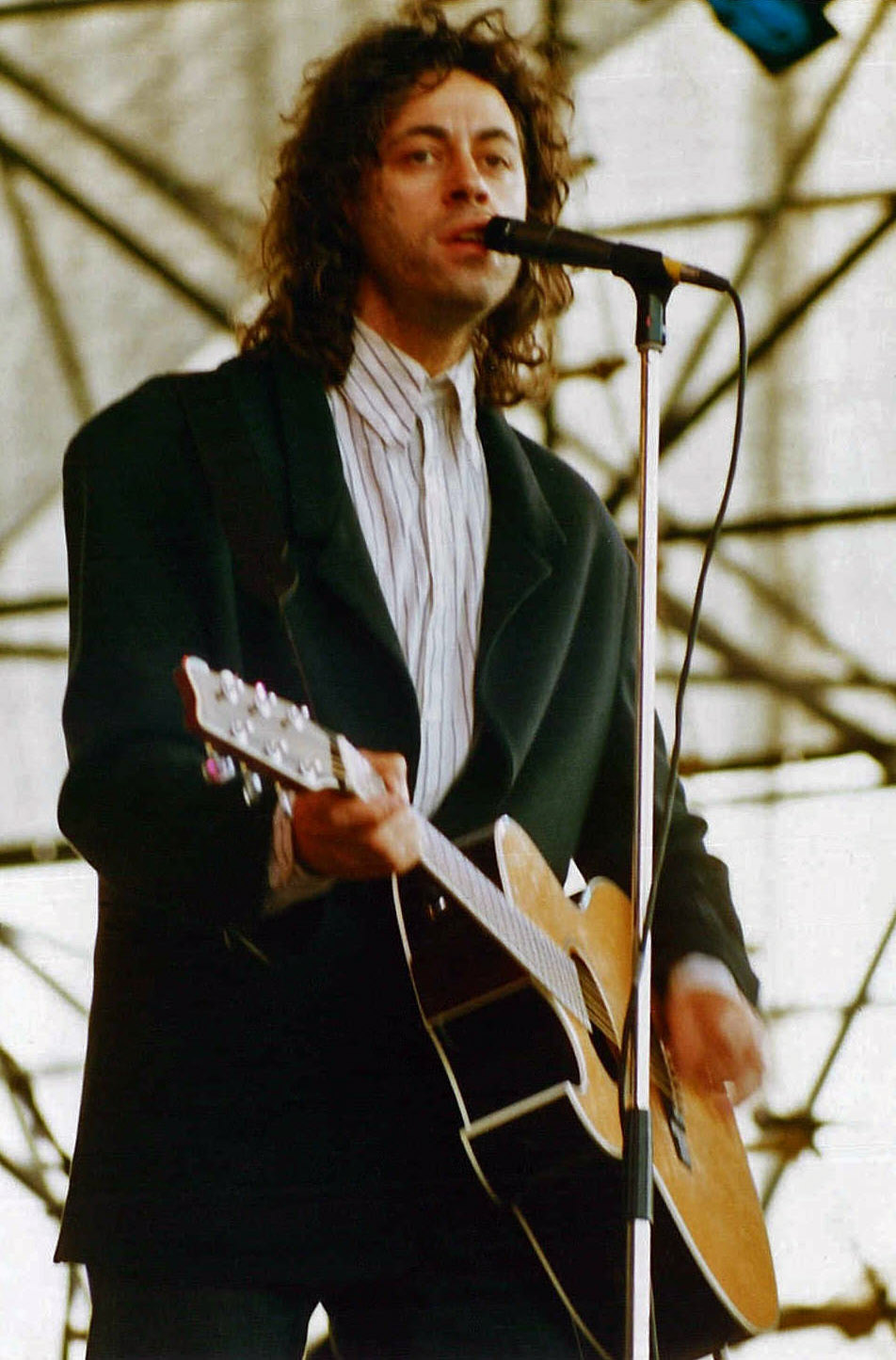 Bildbeschreibung: Bob Geldof bei Rock am Ring 1987 Quelle: Eigenfoto Fotograf/Zeichner: 'ElLo57 (Elmar J. Lordemann) Datum: Juni 1987 Sonstiges: keine Varianten vorhanden